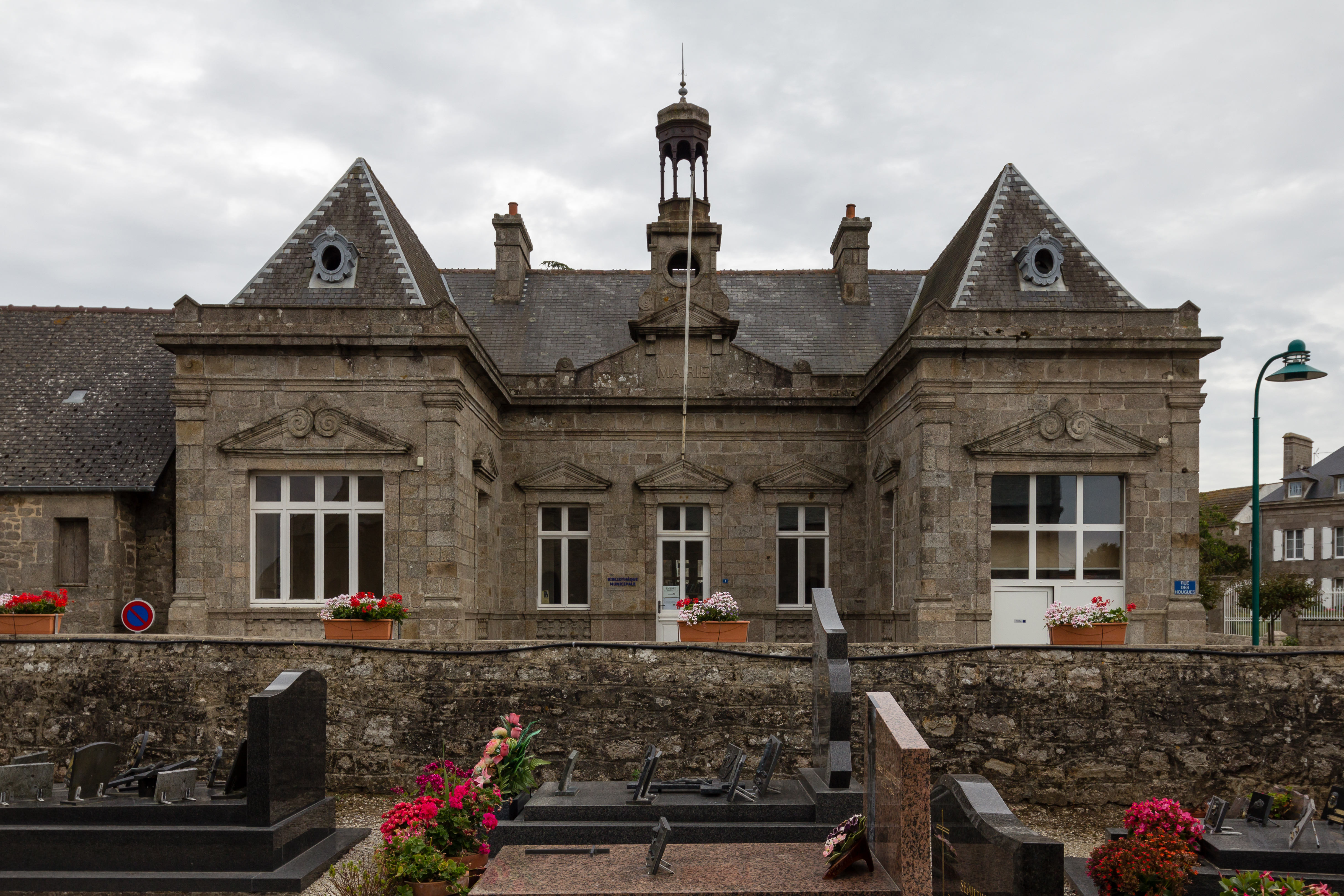 Ancienne mairie, maintenant bibliothèque municipale de Montfarville (France).